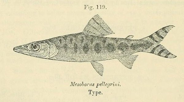 Mesoborus crocodilus